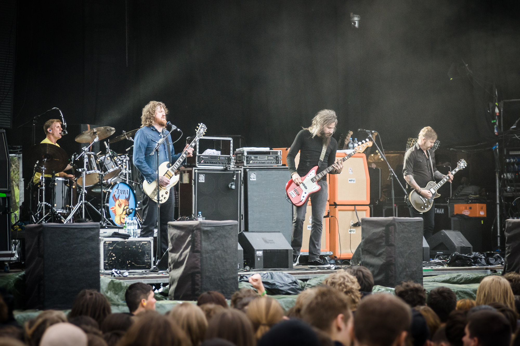 Zespół Mastodon podczas koncertu na festiwalu Ursynalia 2012.